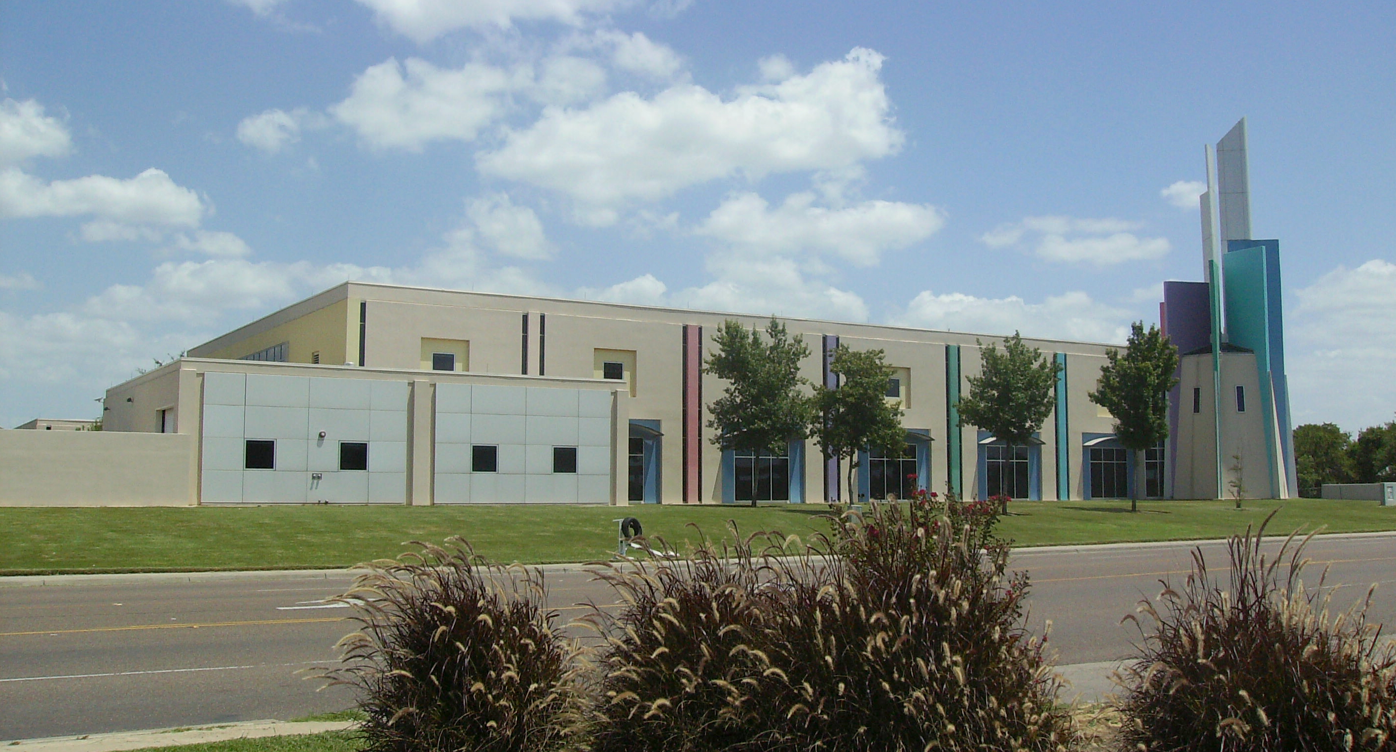 Laredo Public Library